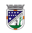 Brasão oficial do município de Santo Antônio de Pádua, no estado do Rio de Janeiro.